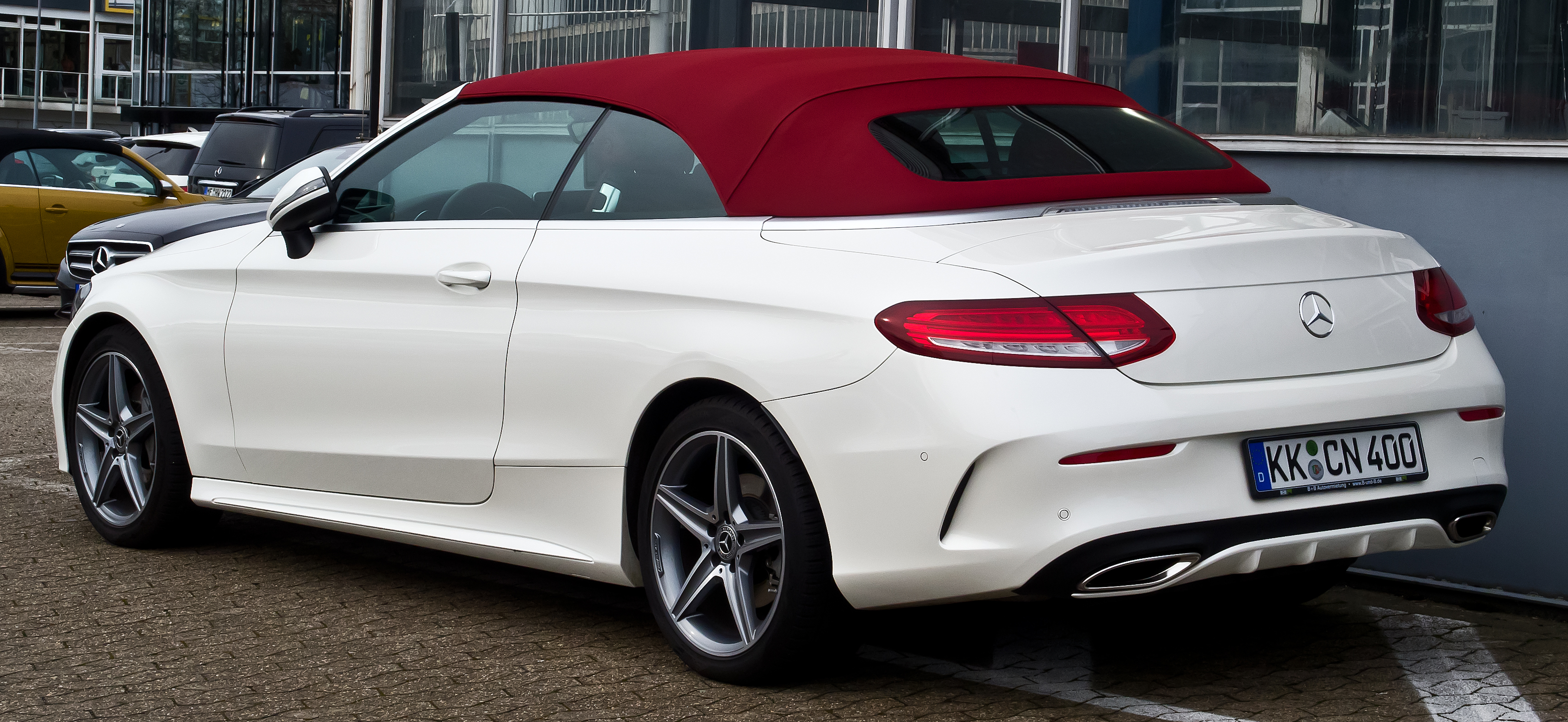 Mercedes-Benz C-Klasse Cabriolet (A 205)